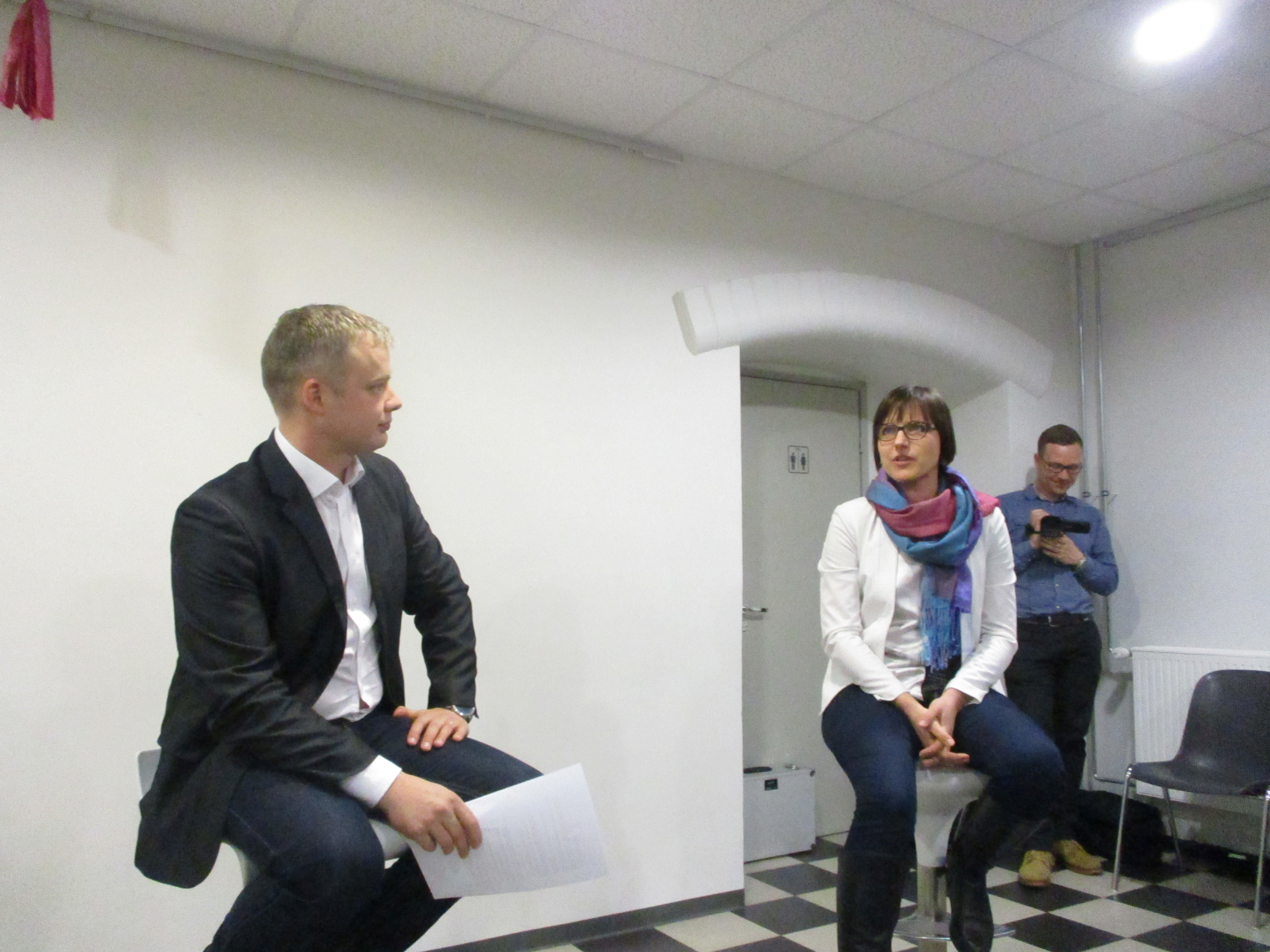 23. veeruaril 2018 a. toimus Viljandi Kultuuriakadeemia Vilma majas Inspiratsiooniõhtu teemal "Ettevõtlikuna maailma". Anneli Ohvril jutustab enda juhitud maailmakoristuse kampaania "World Clean Up Day" kogemusi.